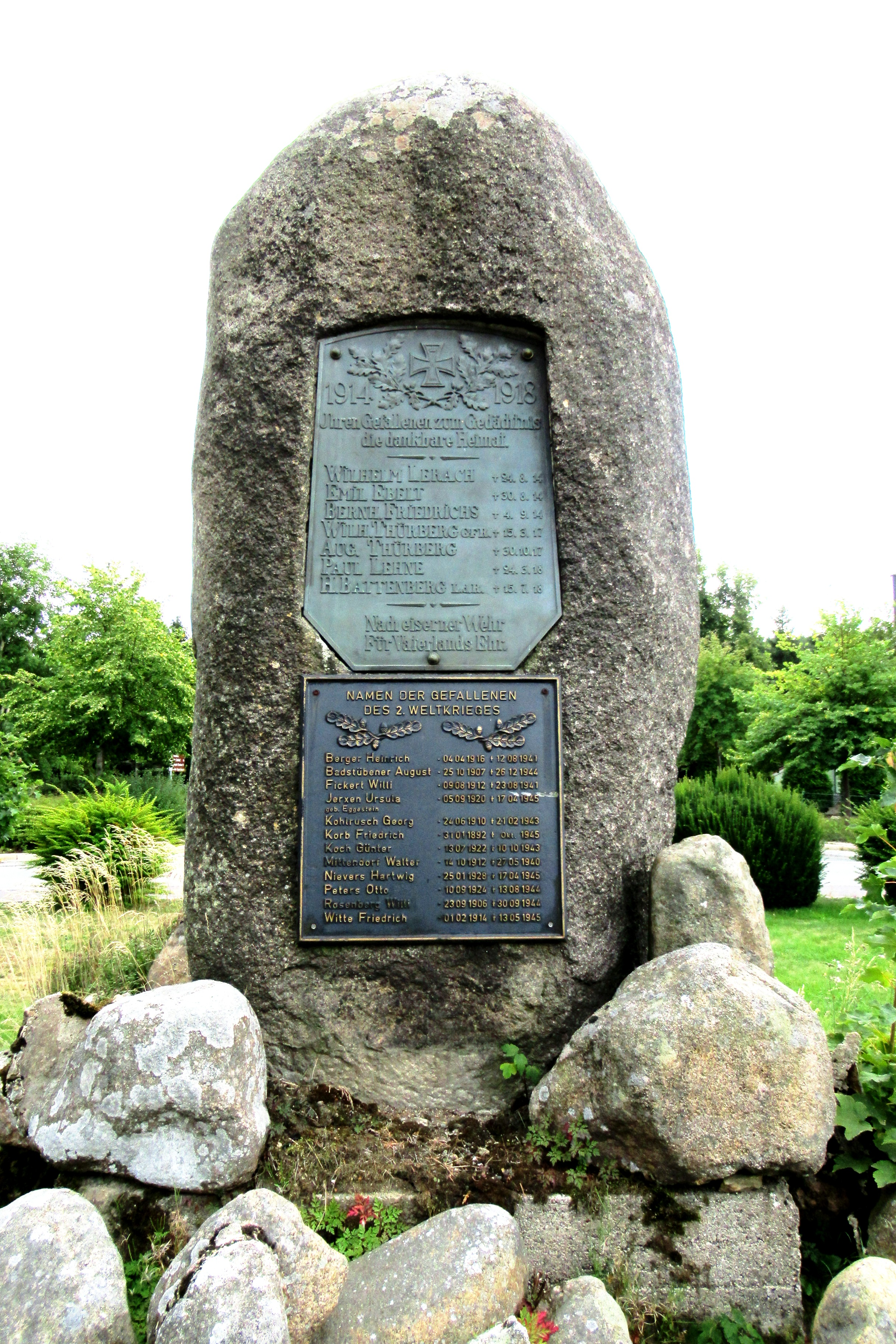 Kuturdenkmal in Elend (Harz)